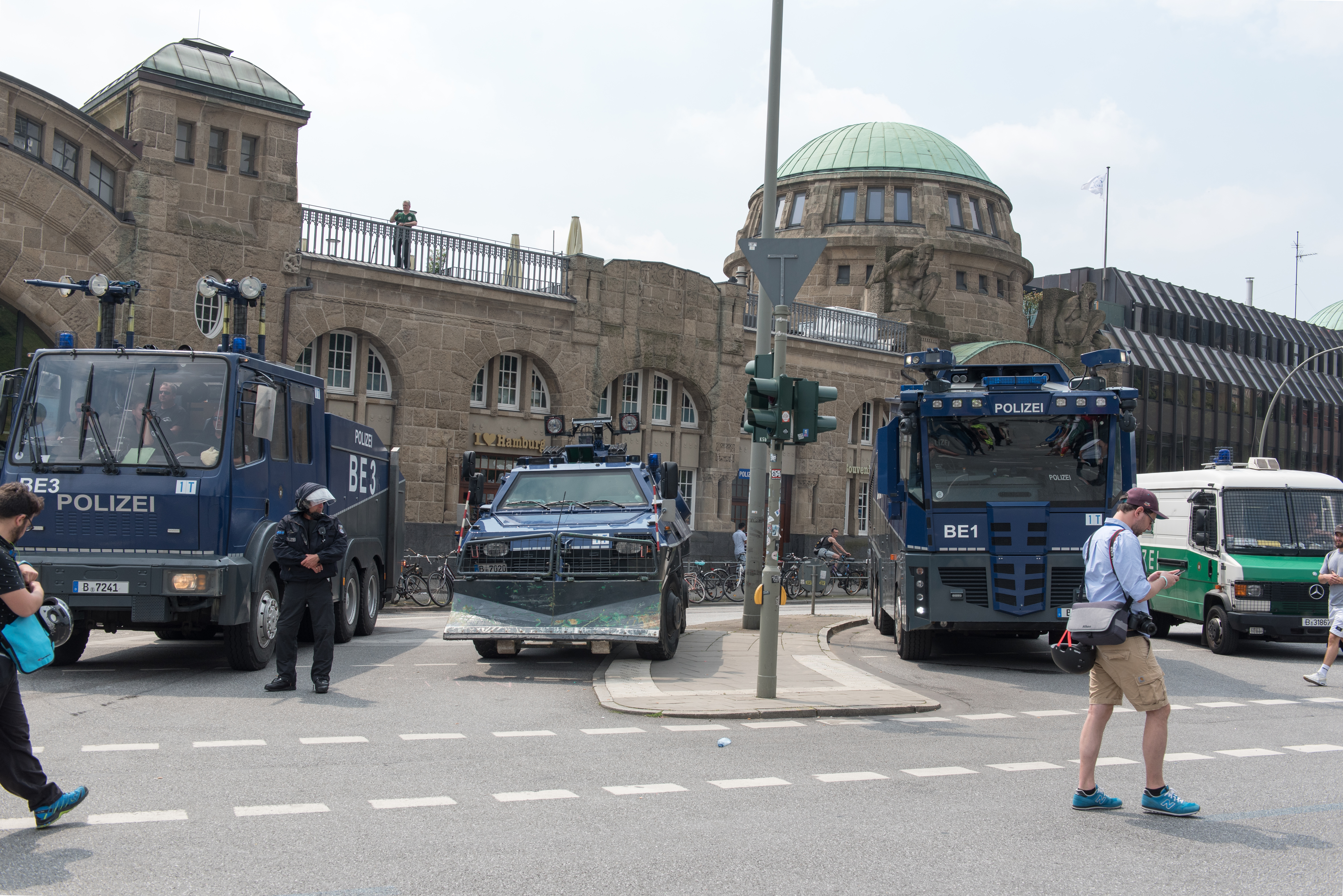 Demo Jugend gegen G20 an den Landungsbrücken